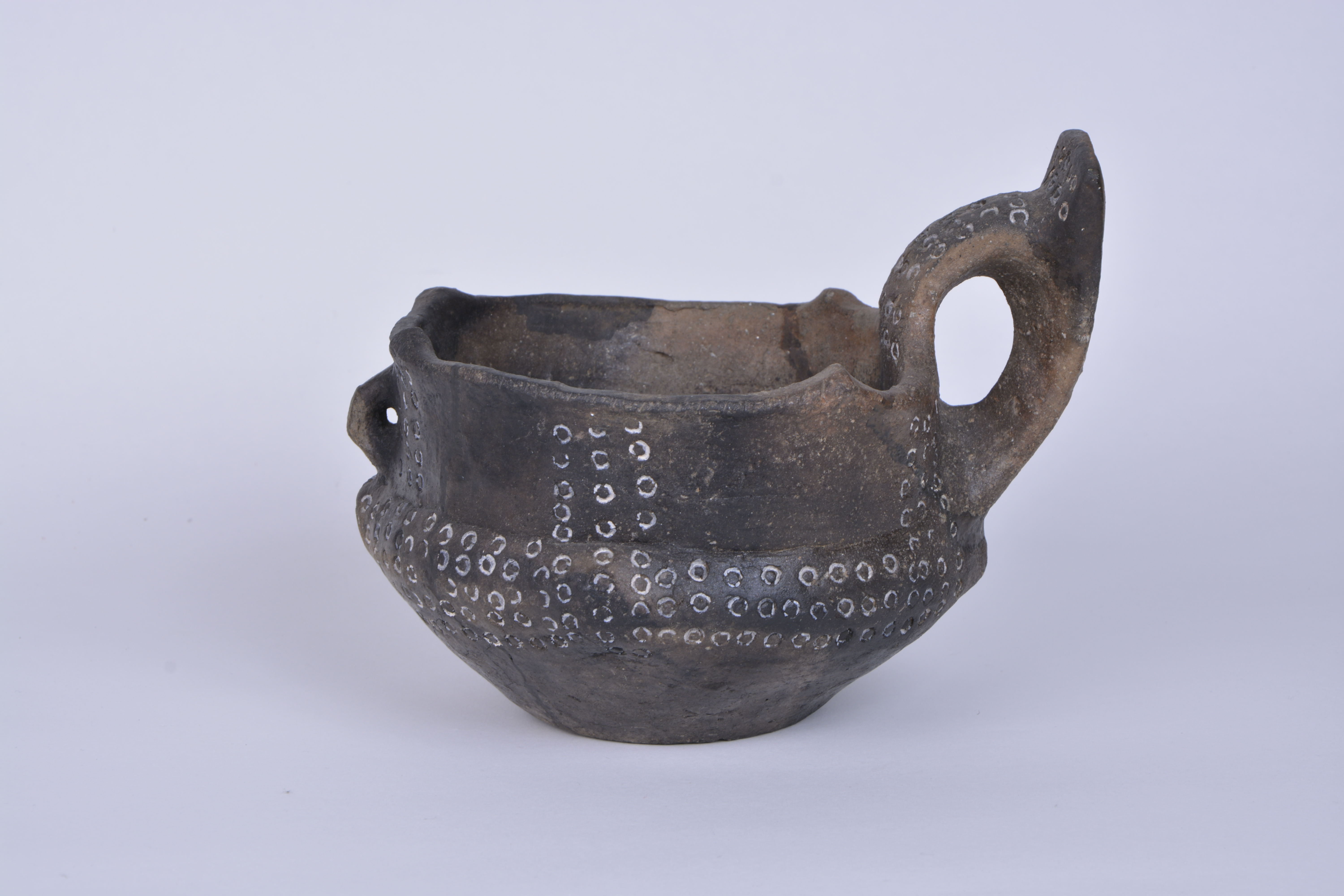 Srpski (latinica): Pehar od keramike iz perioda 13-11. vek p.n.e. Pronađen je arheološkim iskopavanjima iz 2002. godine na Hisaru. Deo je zbirke Hisar u Narodnom muzeju u Leskovcu.